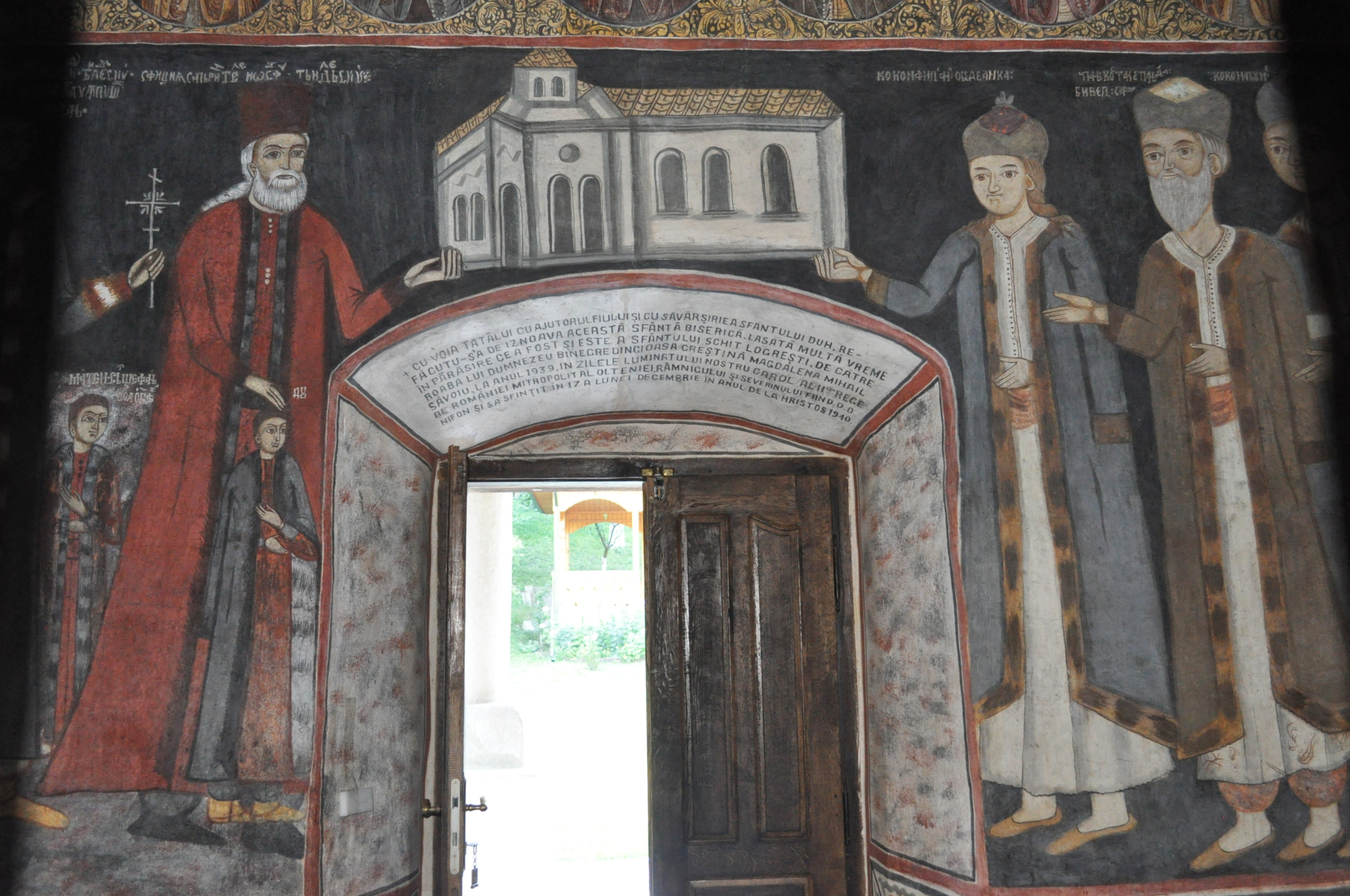 Biserica „Sfinţii Ioachim și Ana”, sat Târgu Logrești; comuna Logrești 01